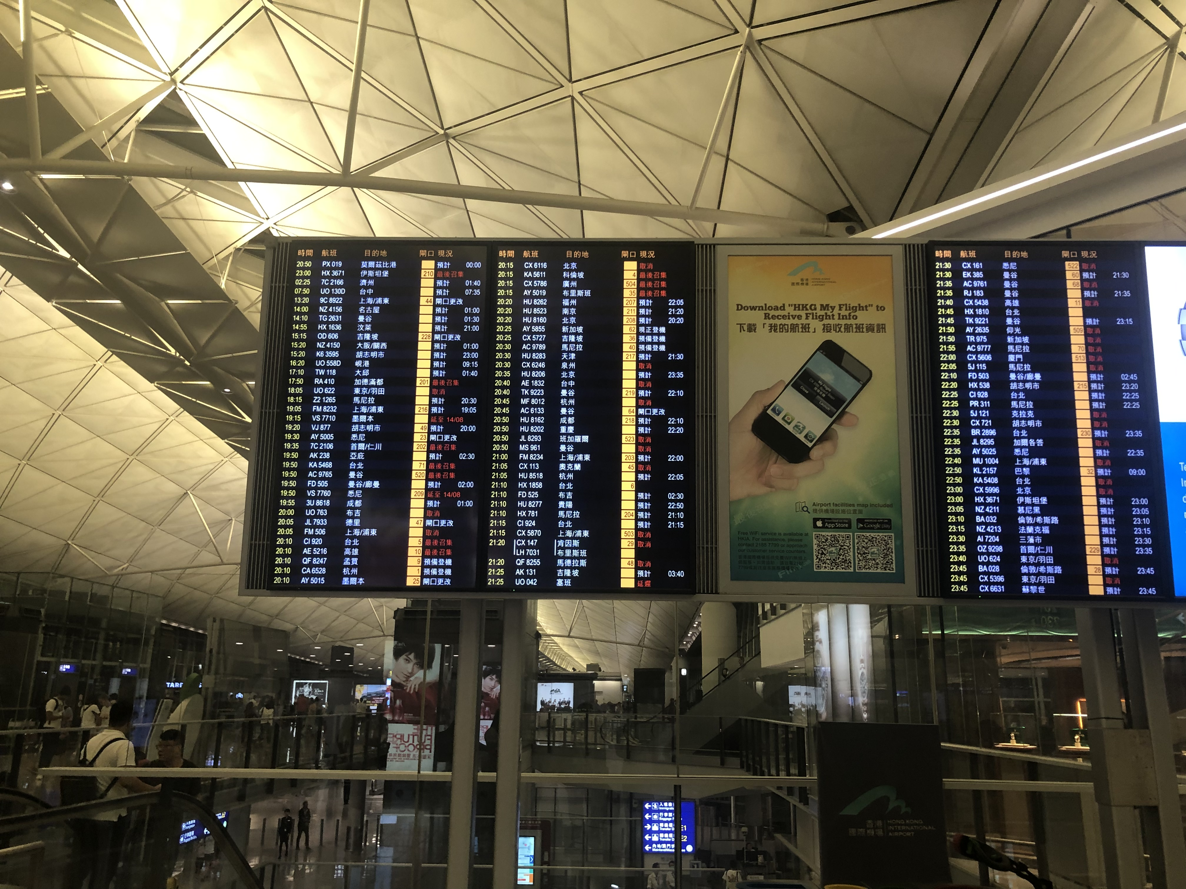 中文（中国大陆）: 受8月13日机场集会影响，当日香港机场部分航班取消